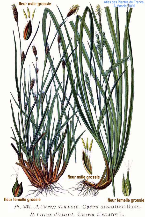 Carex sylvatica Huds., Carex distans L.